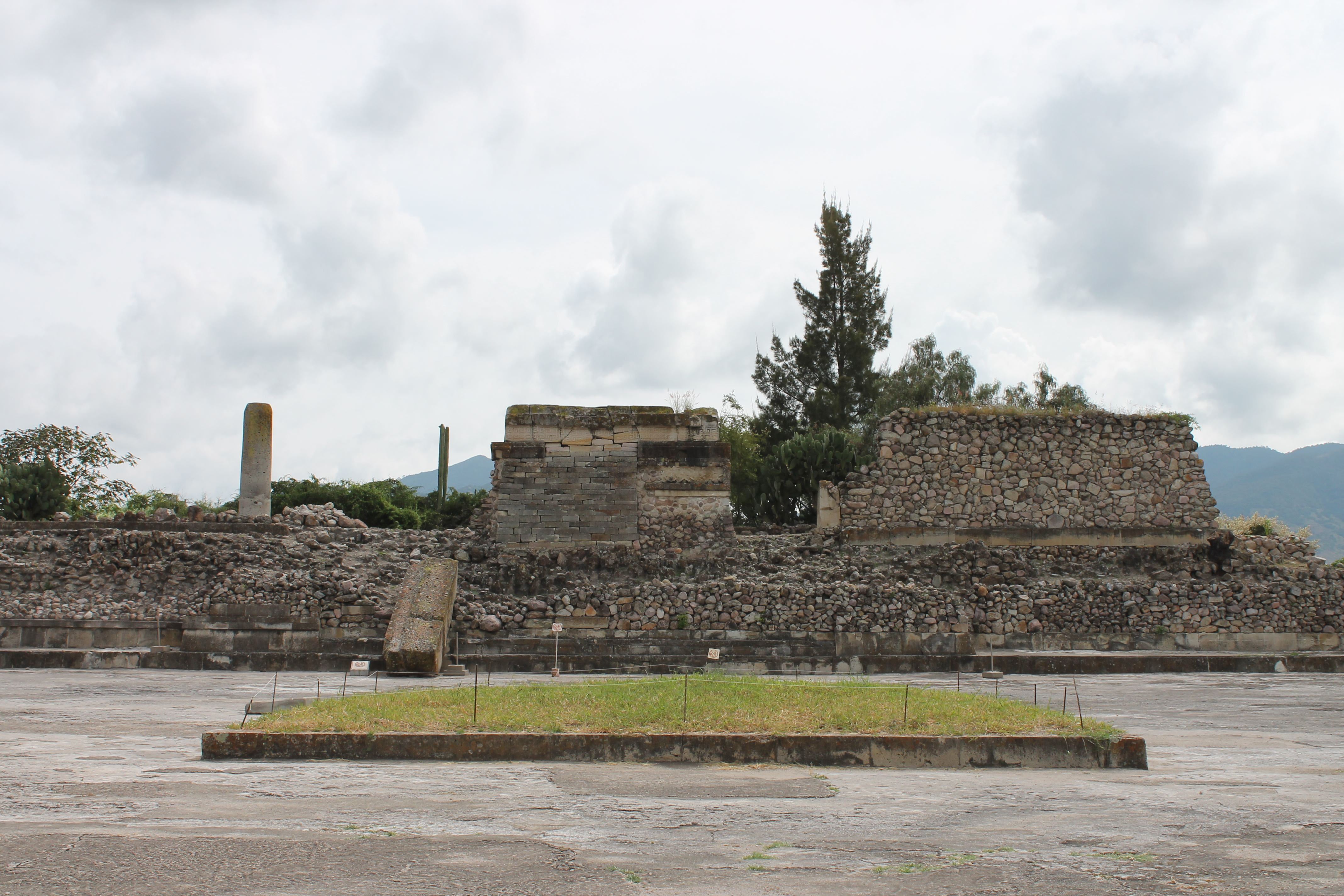 Se muestra una parte del Patio E del Grupo de las Columnas, las edificaciones fueron altamente dañadas tras la conquista.